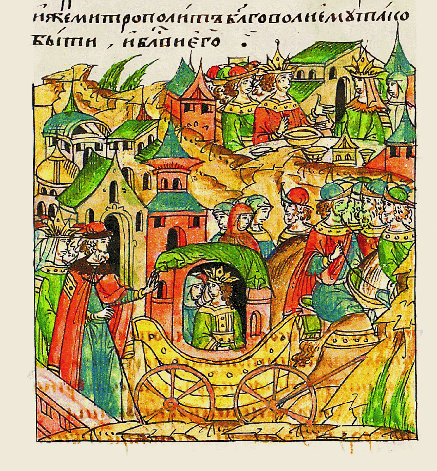 В том же году великий князь Василий Дми- триевич выдал свою дочь княжну Анну в Царьград за царе- вича Ивана Мануило- вича.